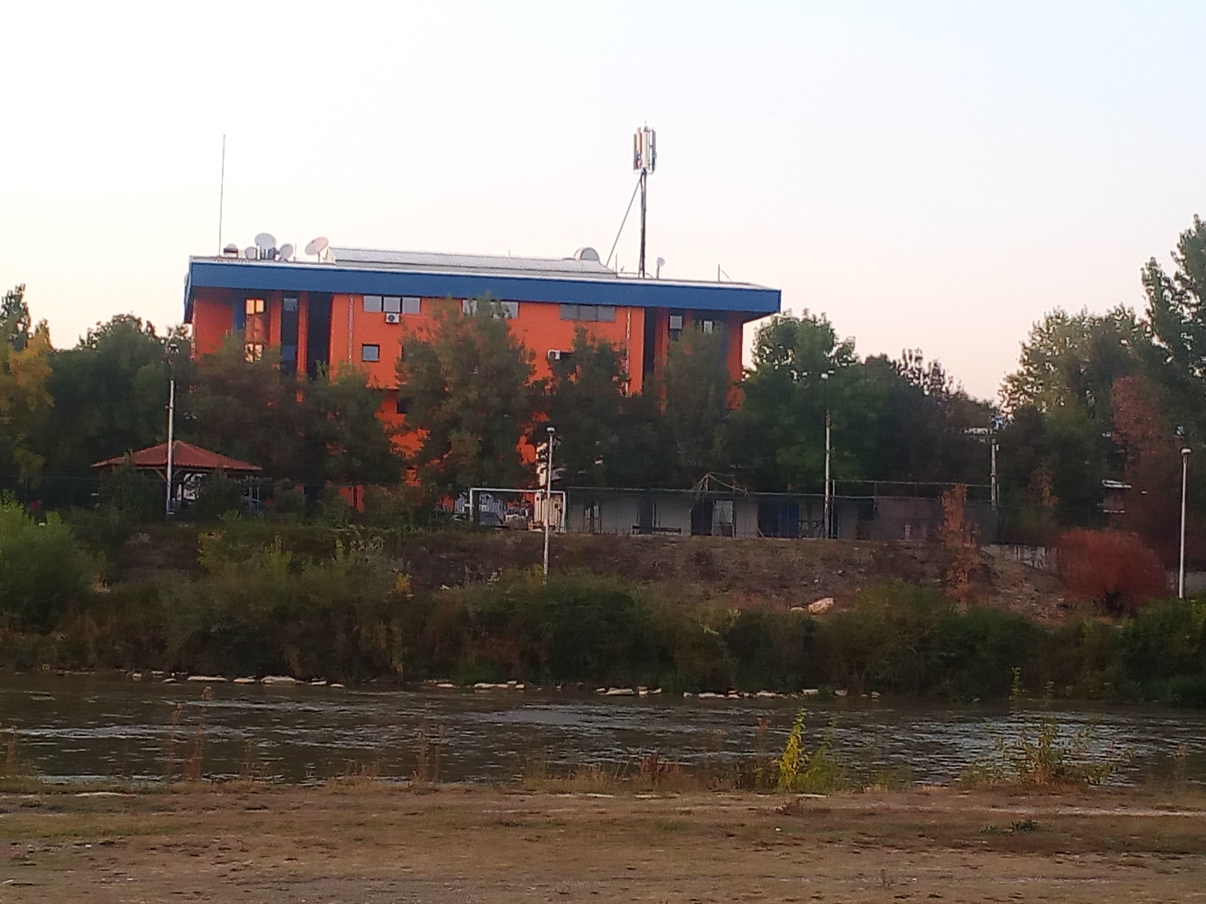 Седиштето на Канал 5 Телевизија